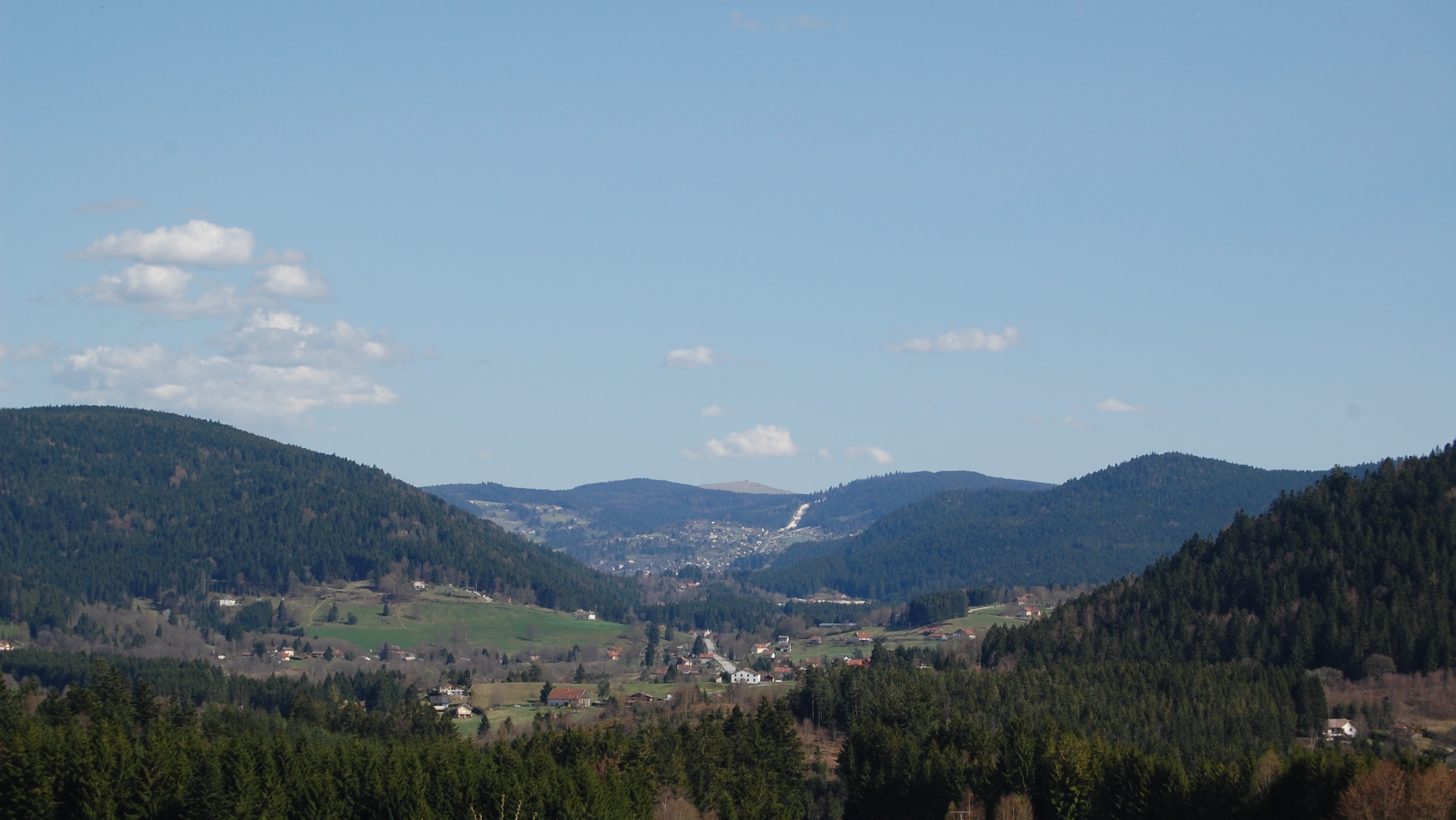 Vue sur Gérardmer et le Hohneck (au fond) depuis Le Tholy (Vosges, France)